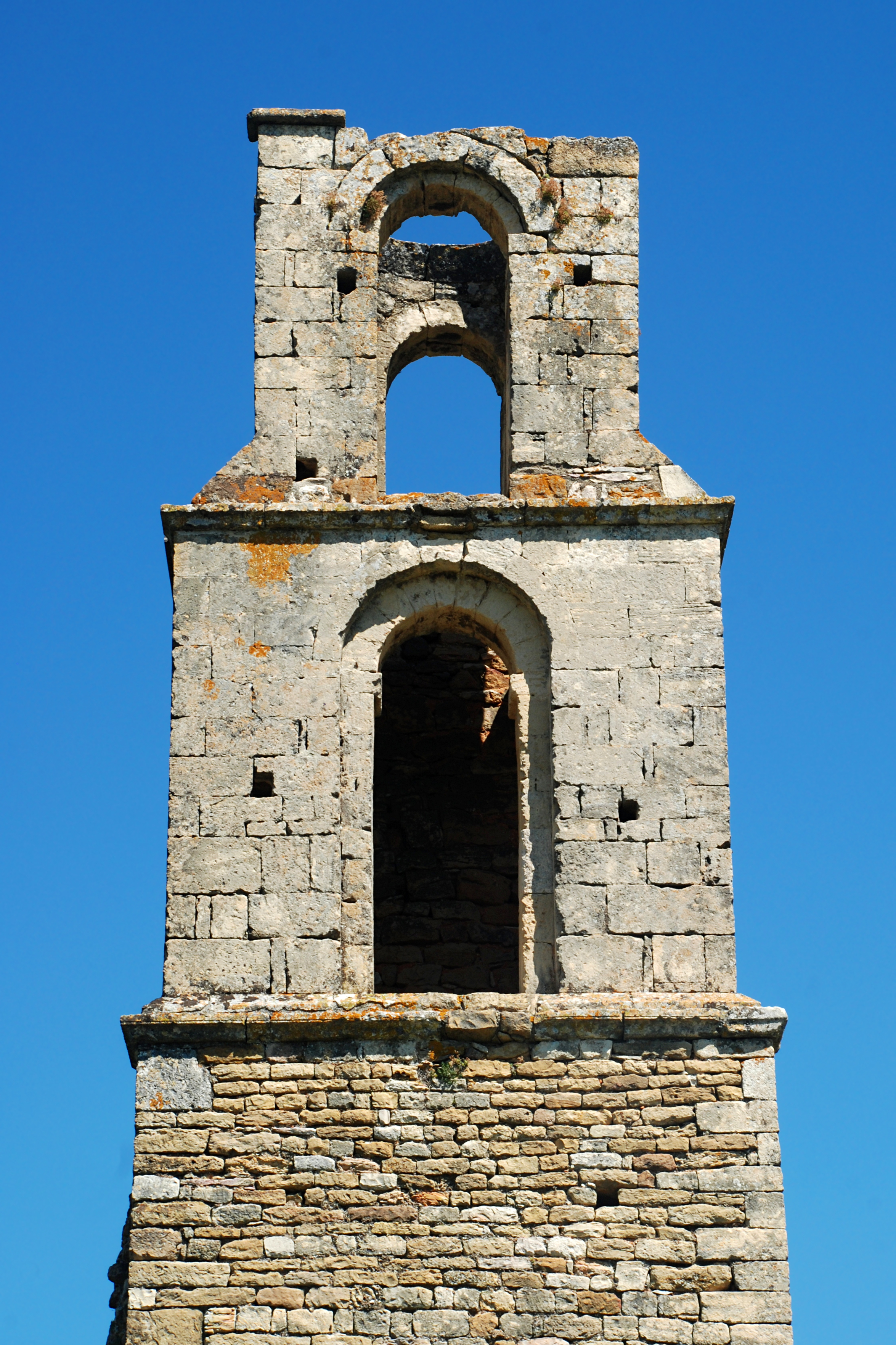 France - Gard - Chapelle Saint-Martin de Saint-Victor-la-Coste